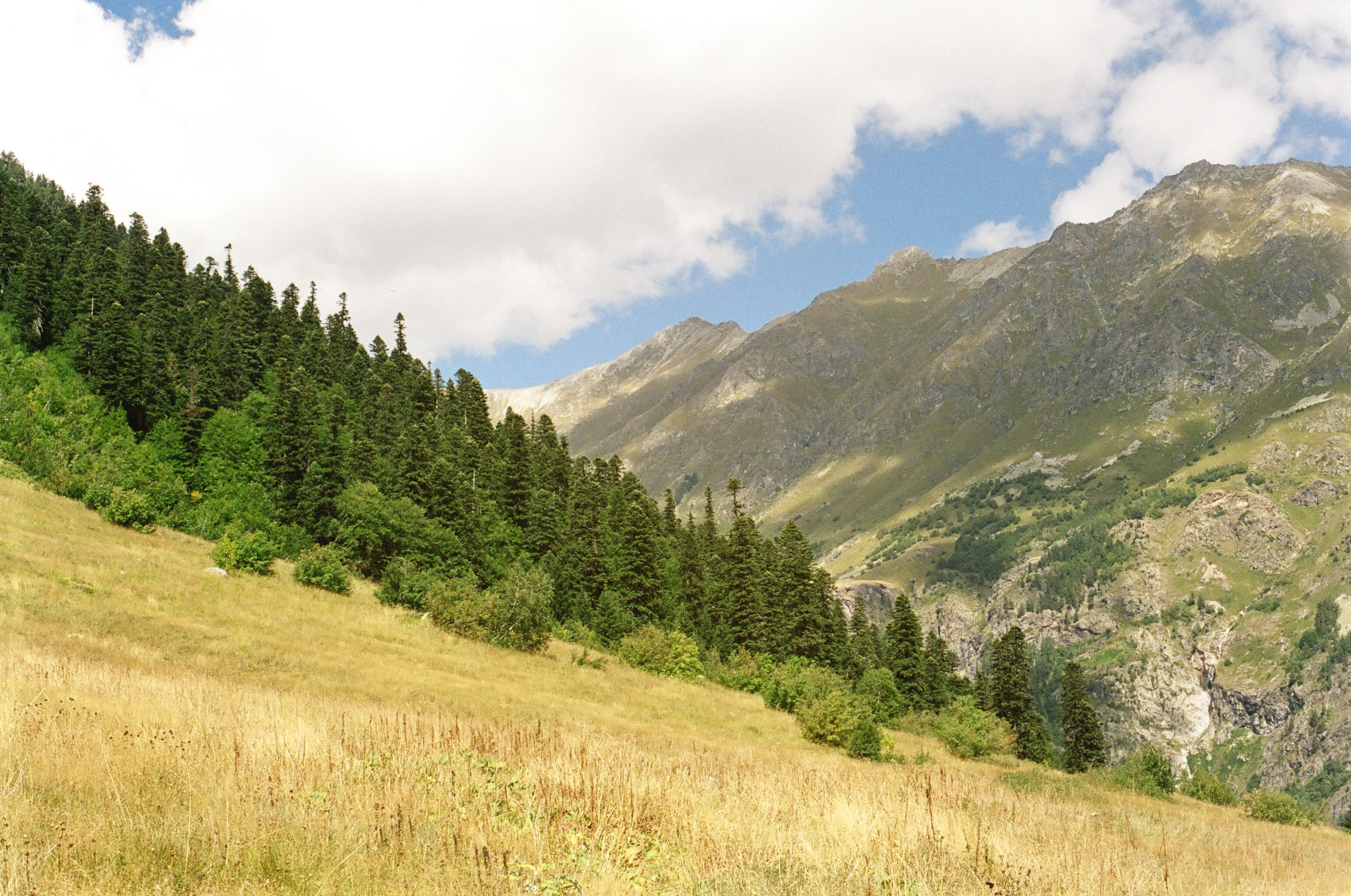 Гоначхирское ущелье. Тебердинский заповедник